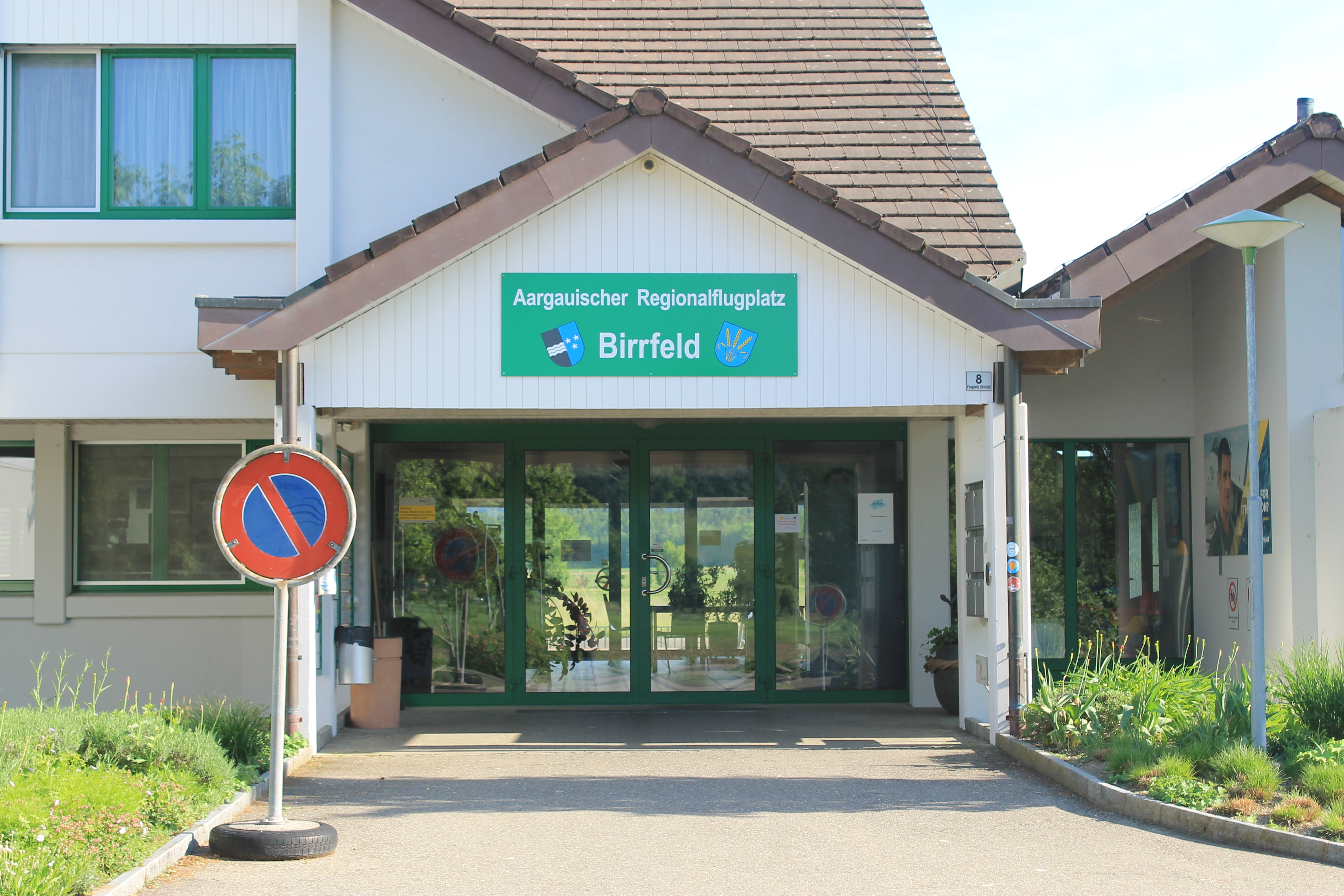 Eingang Regional Flughafen Birrfeld